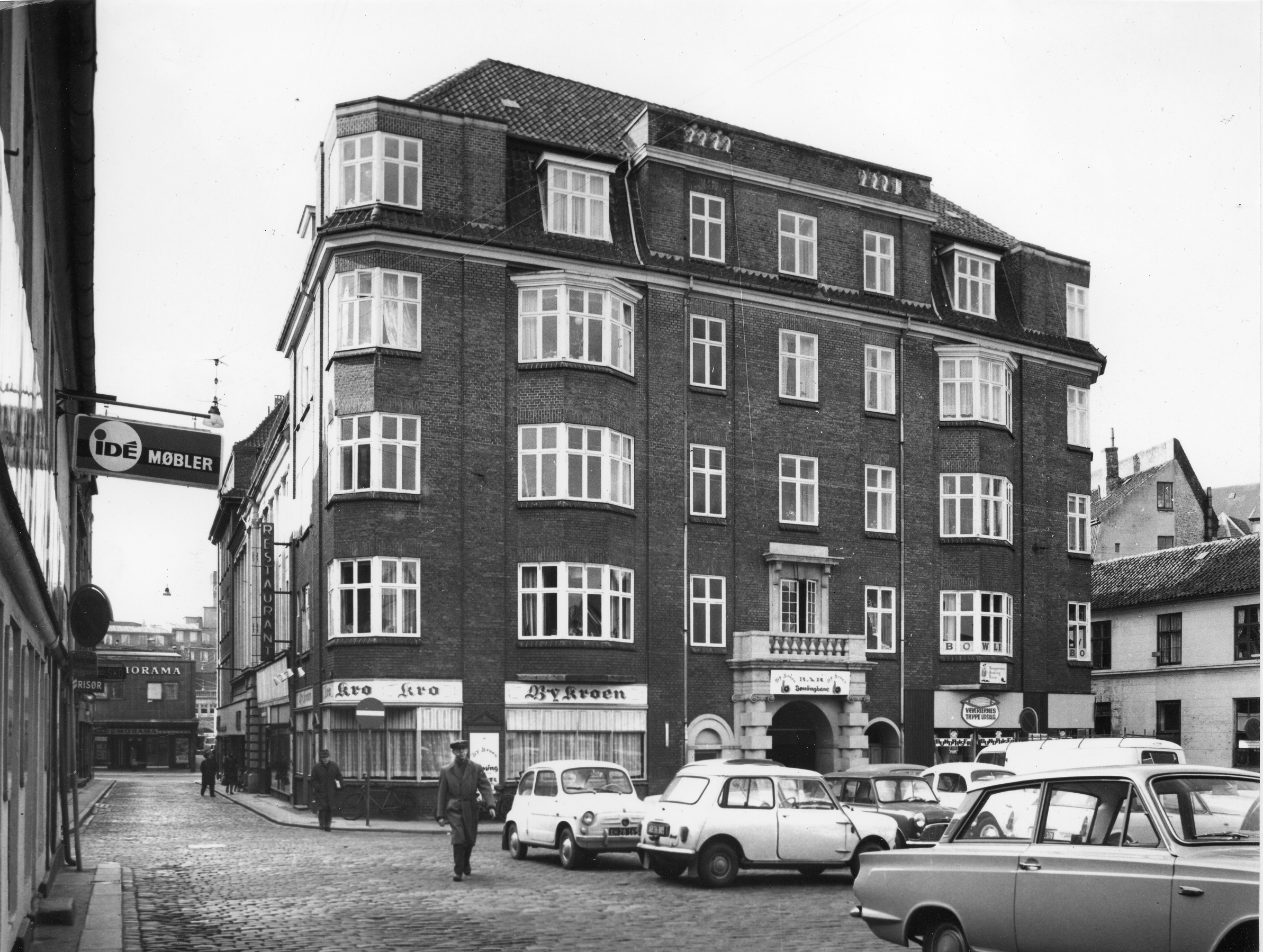 Borgporten set fra Volden. Fotograf: Poul Pedersen, 1967, Poul Pedersens Samling, Aarhus Stadsarkiv.